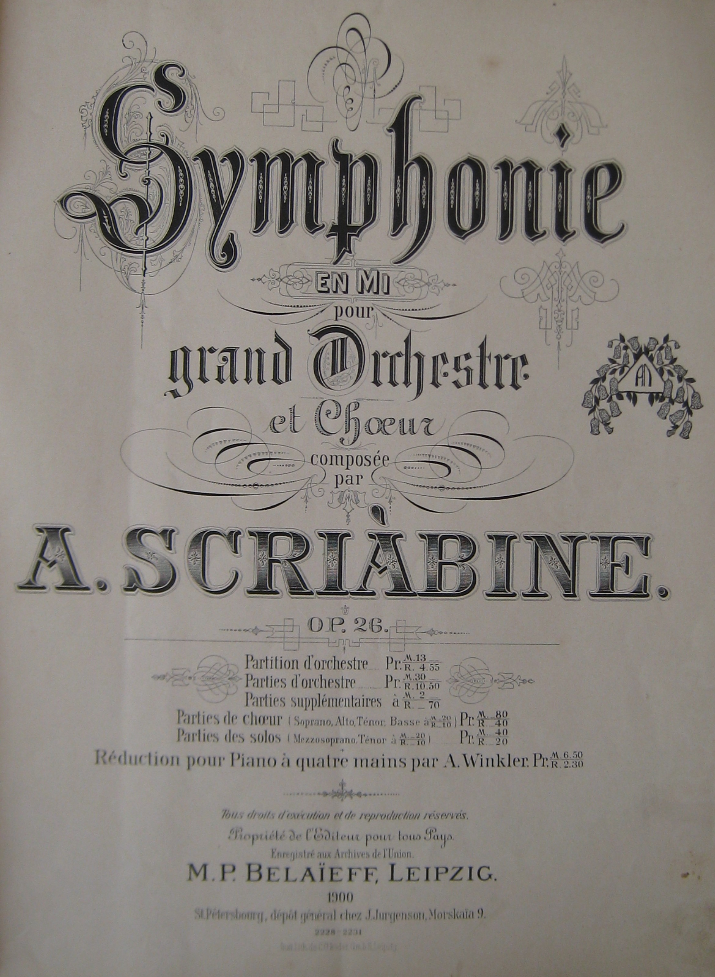 ORIGINALAUSGABE für KLAVIER 1900 LEIPZIG